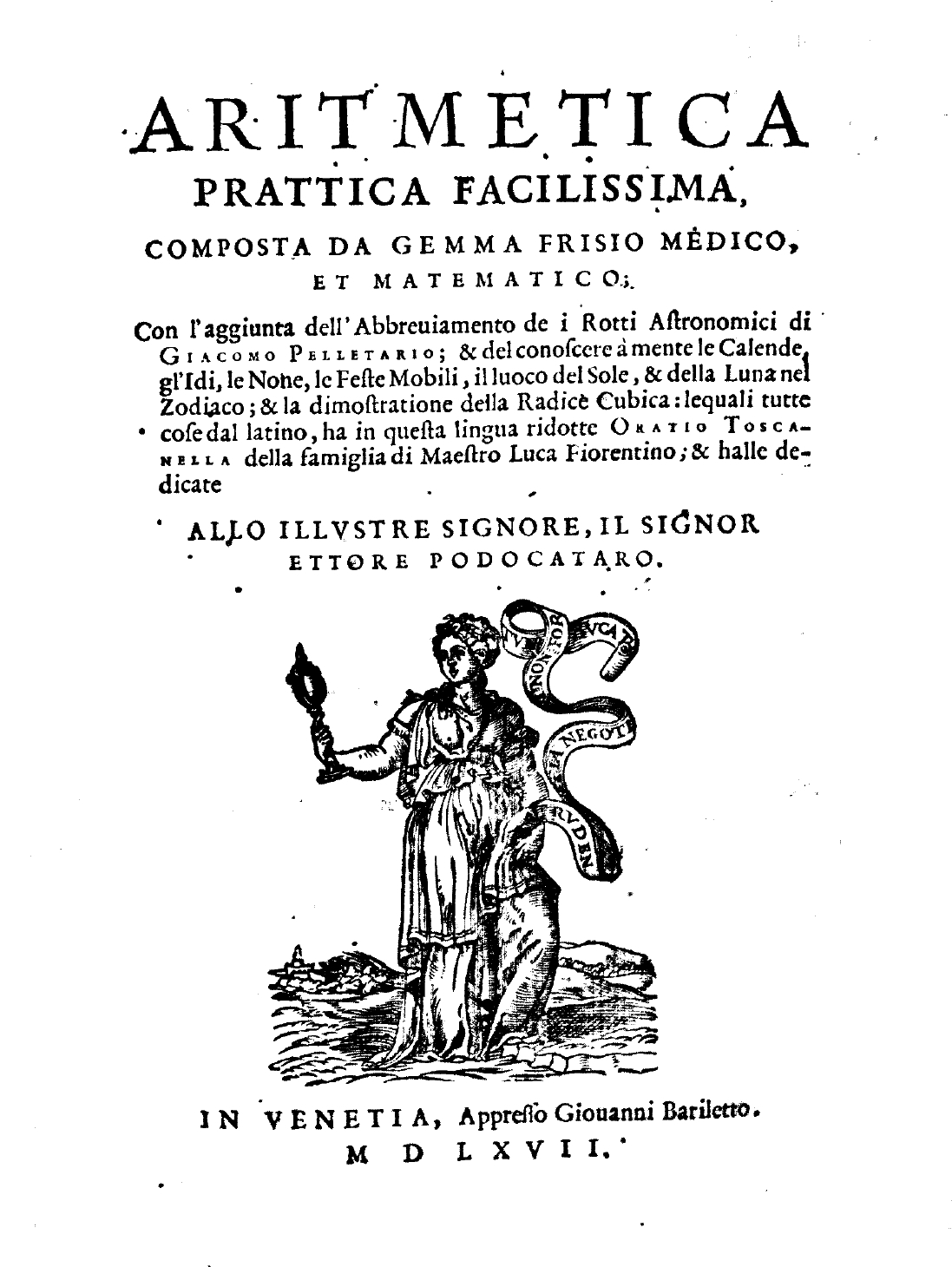 Aritmetica prattica facilissima, composta da Gemma Frisio medico, et matematico; con l'aggiunta dell'Abbreuiamento de i rotti astronomici di Giacomo Pelletario; & del conoscere a mente le calende, gl'idi, le none, le feste mobili, il luoco del sole, & della luna nel zodiaco; & la dimostratione della radice cubica: lequali tutte cose dal latino, ha in questa lingua ridotte Oratio Toscanella .... - In Venetia : appresso Giouanni Bariletto, 1567 (In Venetia : appresso Giouanni Bariletto, 1567). - [4], 51 [i.e. 49, 1] c. ; 4º .